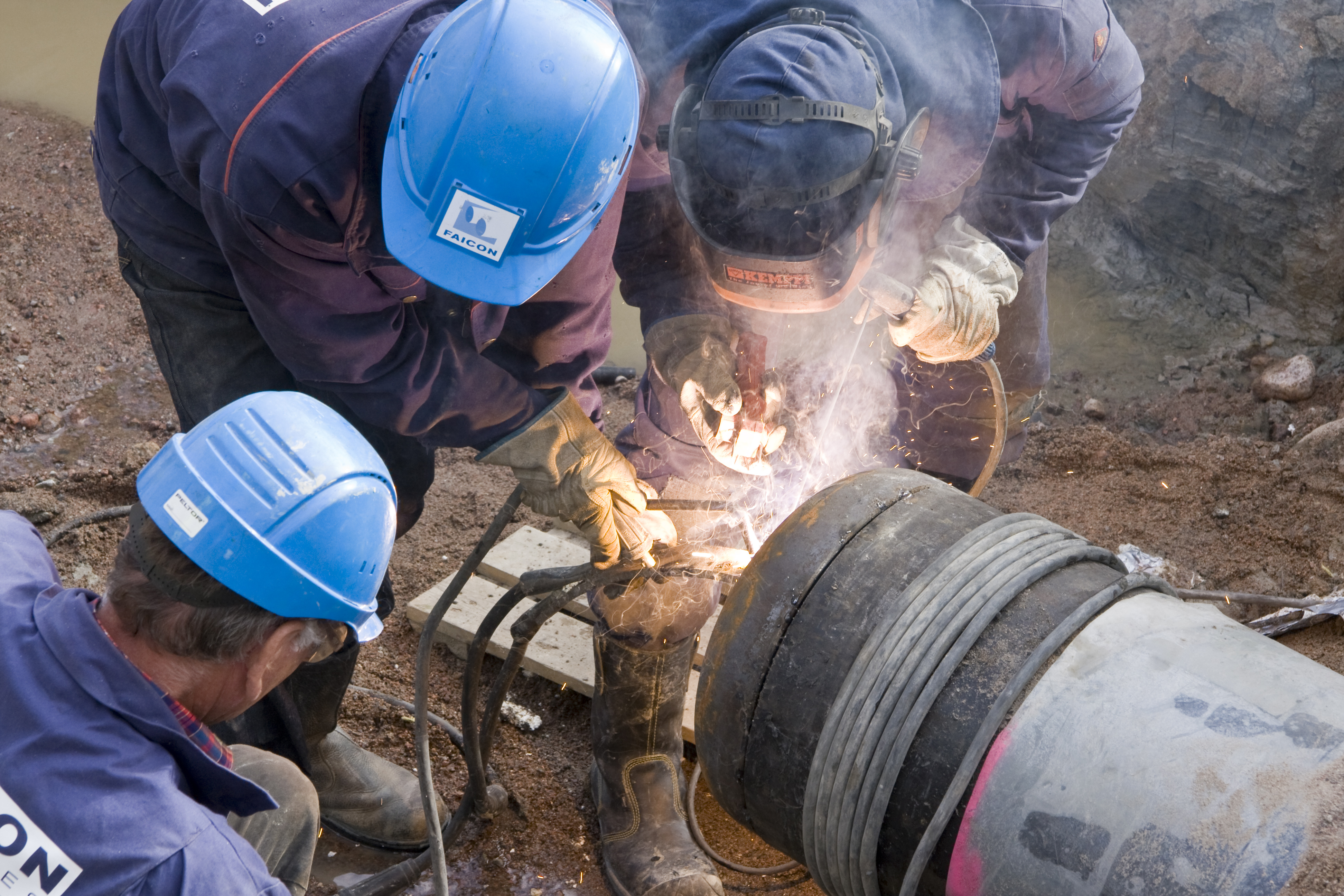 Maakaasuputken asentaminen sijaintipaikalla. Suomi, 2007.